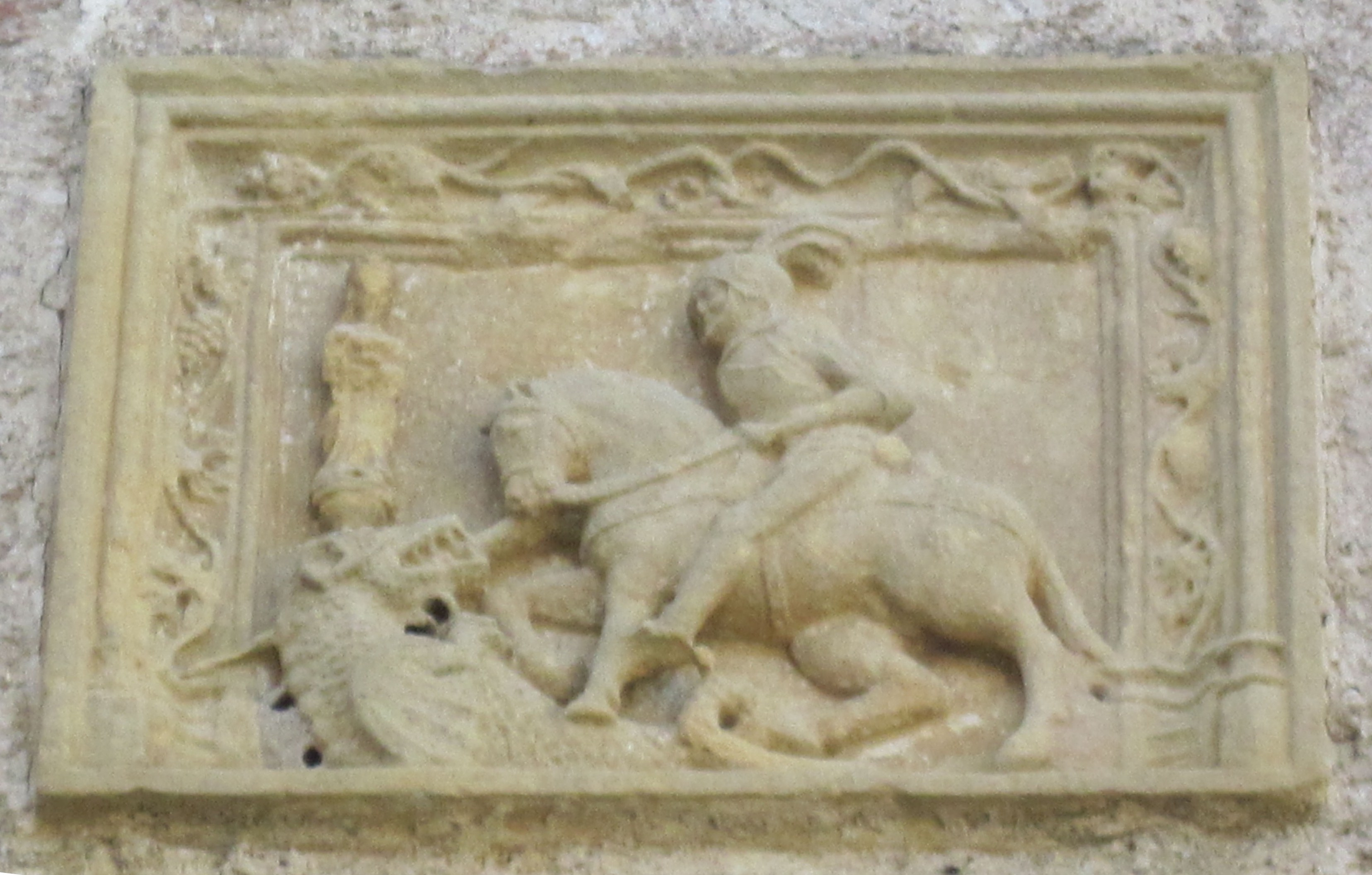 Vannoz (Jura) - Château - st Georges